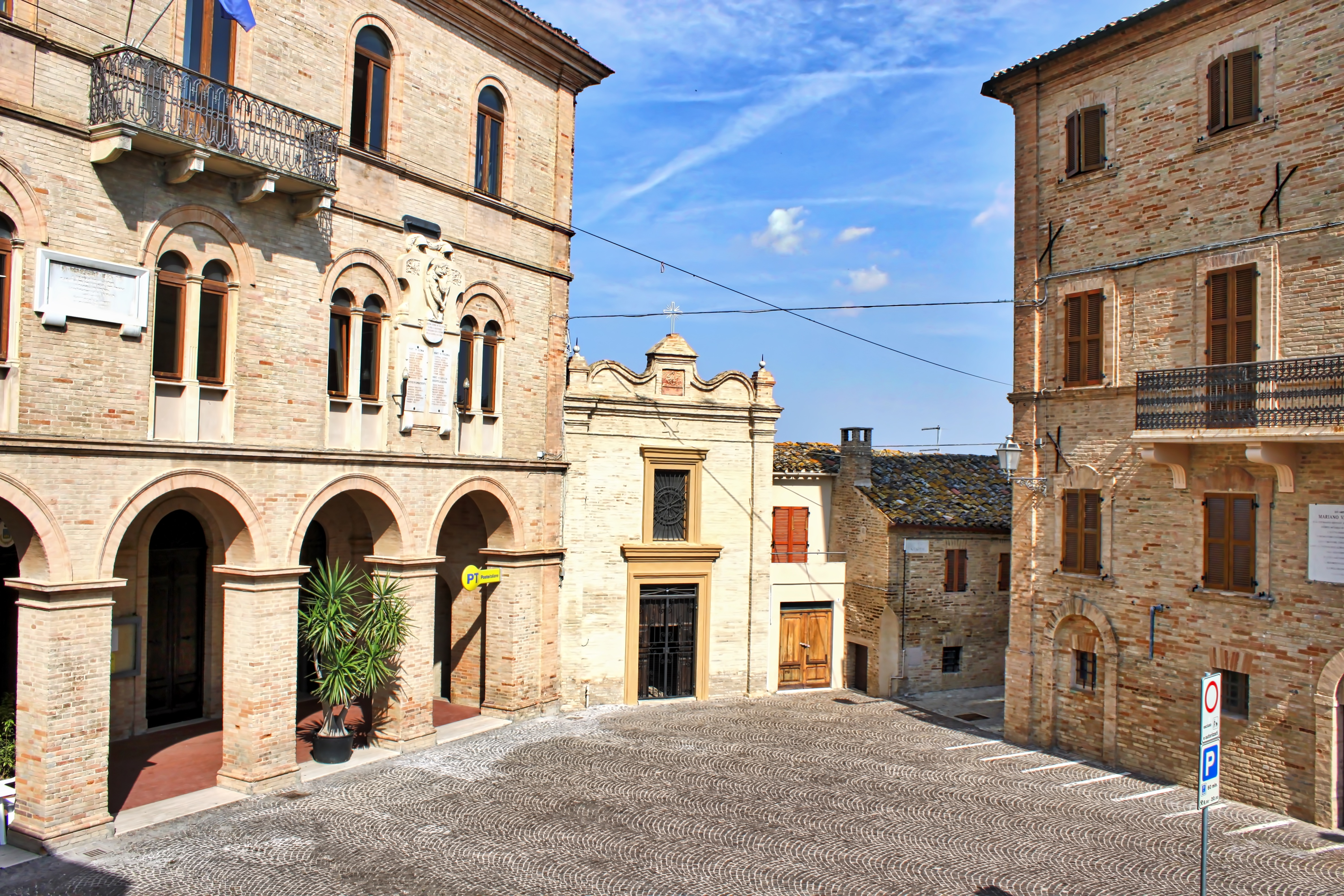 Oratorio di Santa Monica con a fianco sulla sinistra il Palazzo Comunale e a destra il Palazzo Vannozzi